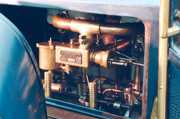 Mercedes-Simplex, Motor-Ansaugseite mit Kolbenvergaser, verkapselter Einlassnockenwelle und offen stehenden Ventilschaeften und -federn.